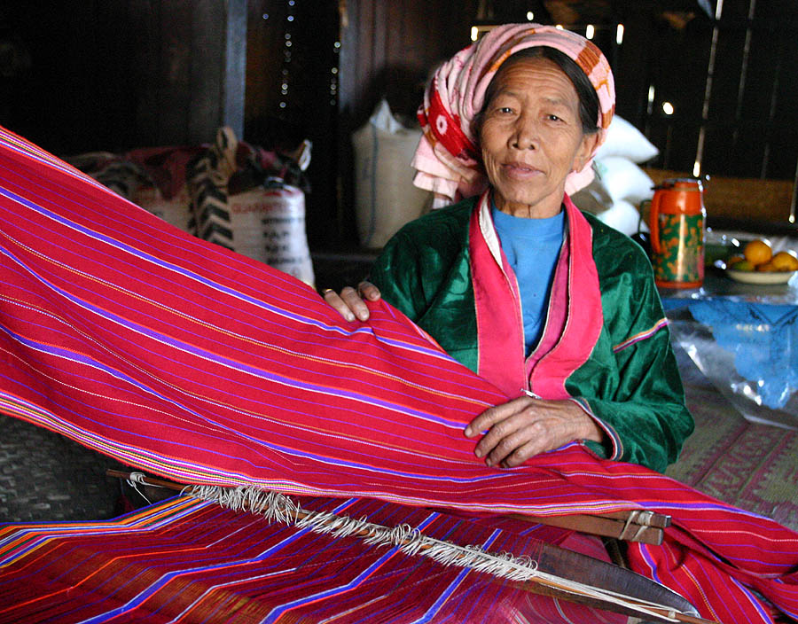 A Palaung tribal woman near Kalaw, Shan State, Myanmar.